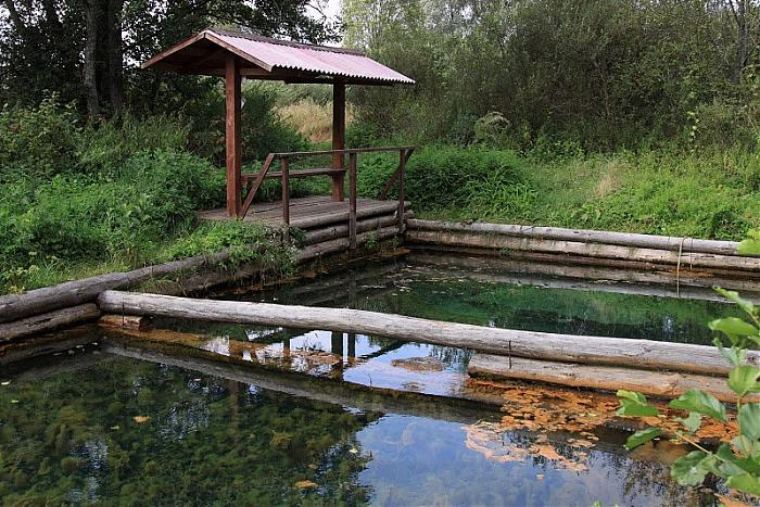 Родник в деревне Поповка Юхновского района Калужской области России.